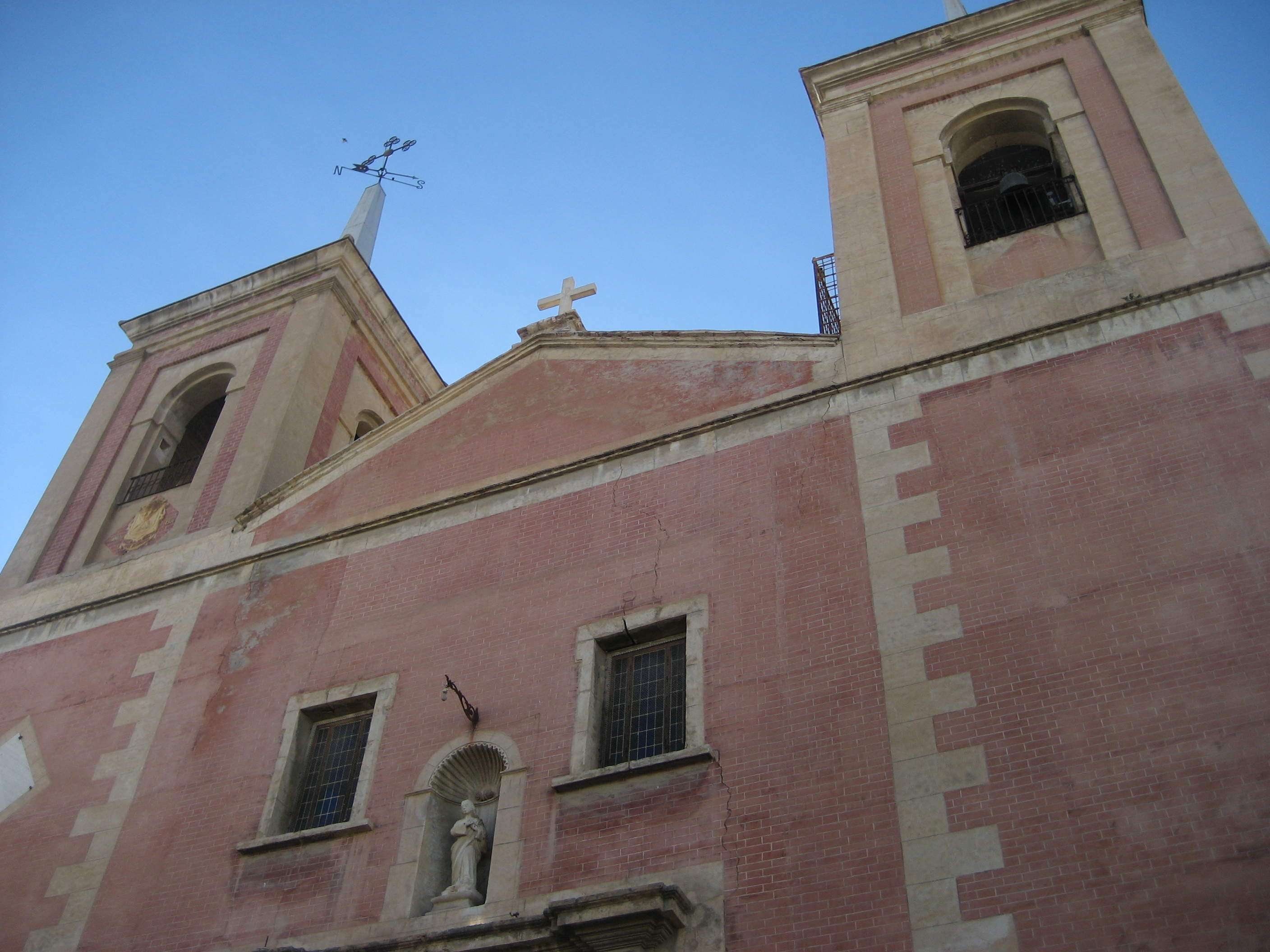 Frontal de la Iglesia de Ntra. Sra. de la Encarnación de Cuevas del Almanzora (Almería)